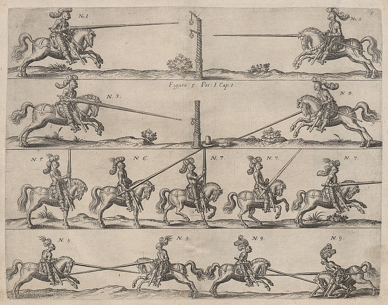 Original image description from the Deutsche Fotothek Kriegskunst & Pferd & Lanzierer & Lanze